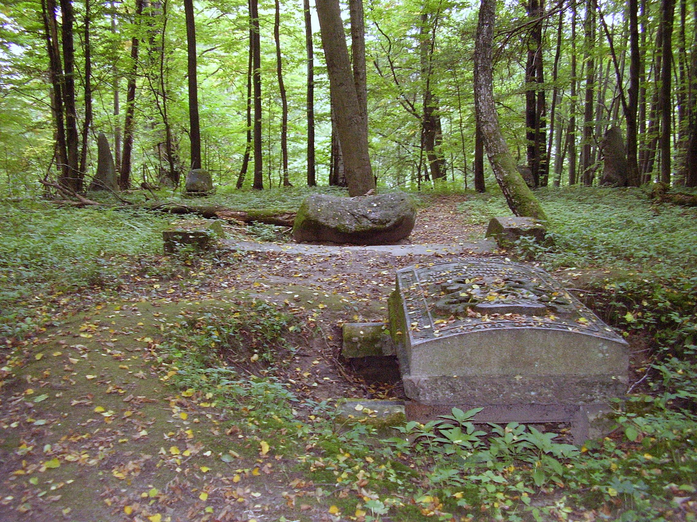 pseudomegalityczny cmantarz rodziny Dohnów (graff zu Dohna)